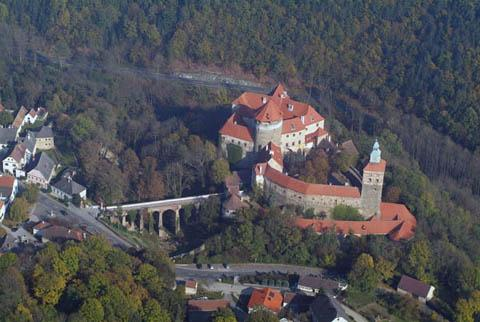 Stadtschlaining, Austria, aerialphotography